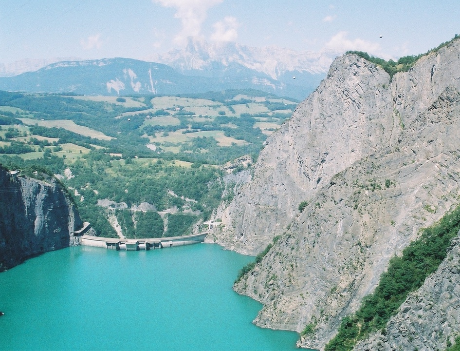 Le barrage de Monteynard-Avignonet